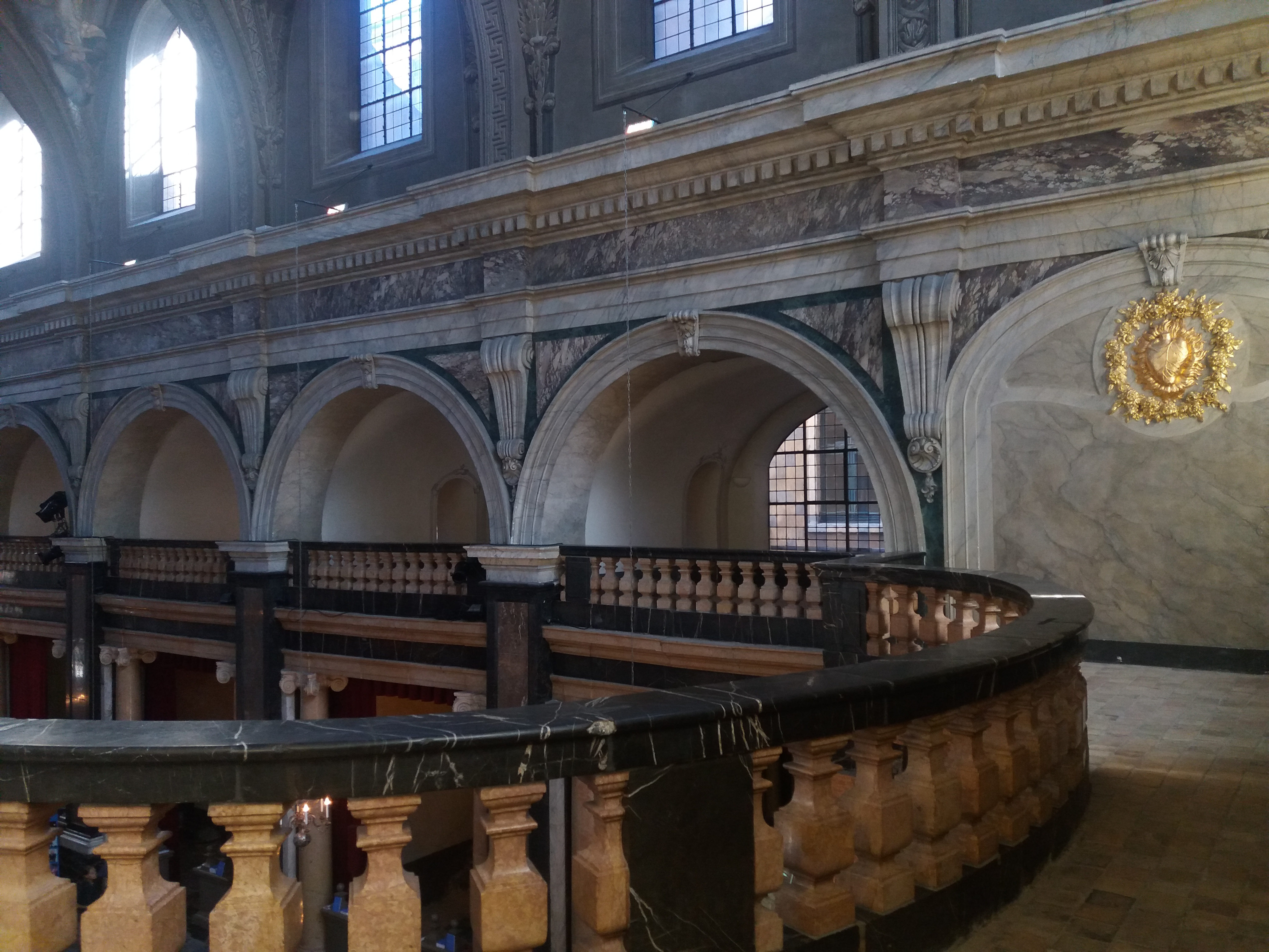 Arcades et Sacré Cœur.